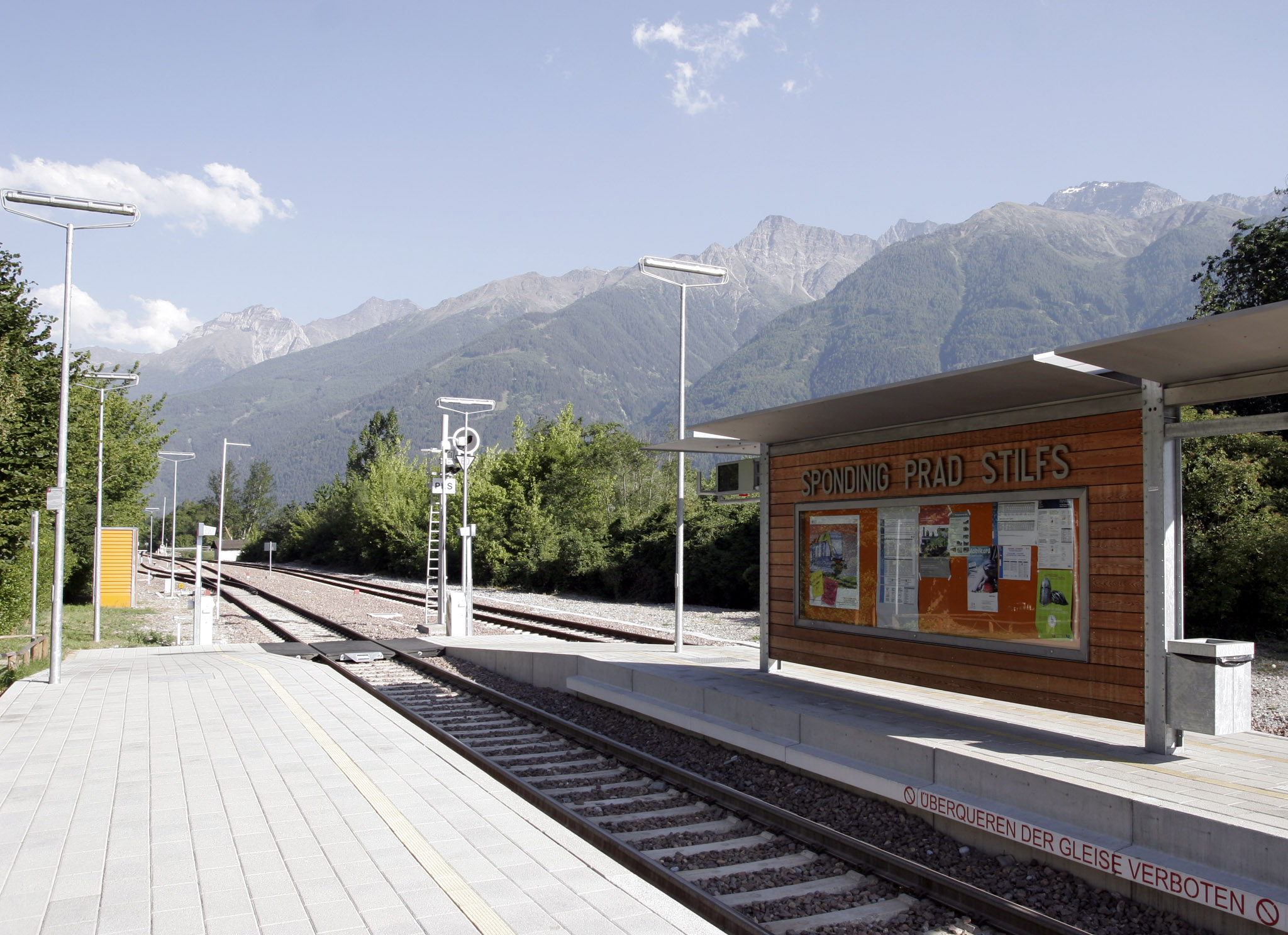 Der Bahnhof von Spondinig (Fraktion von Schluderns) auf der Strecke der Vinschgerbahn (Südtirol)